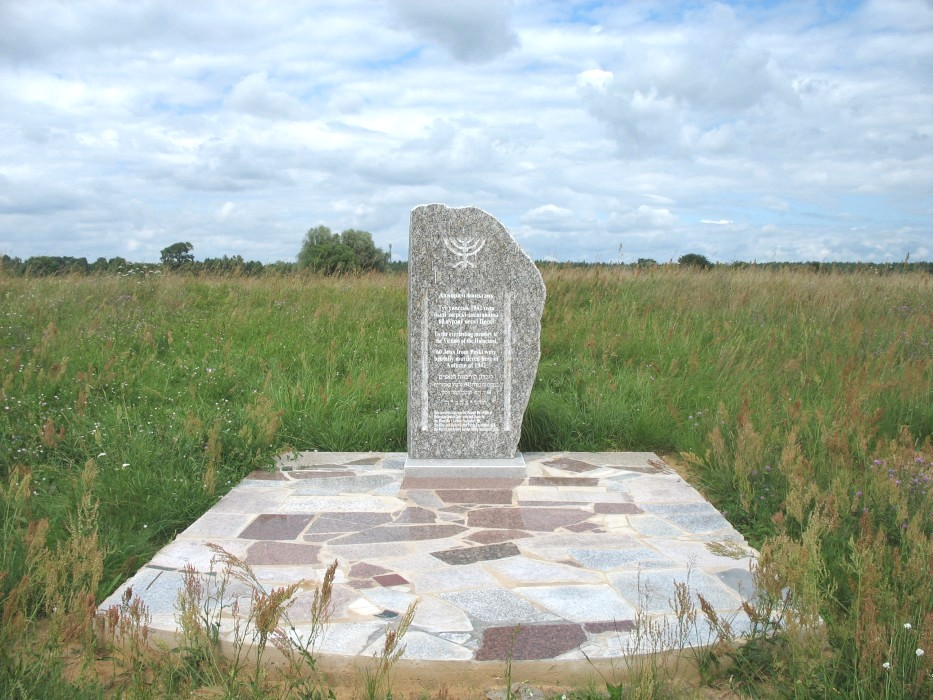 Памятник убитым во время Холокоста евреям деревни Пески Мостовского района Гродненской области. Установлен в 2009 году.